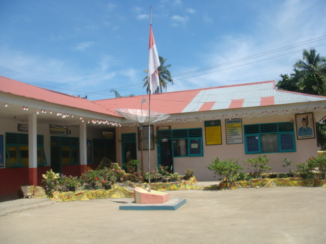 sd 06 anakan